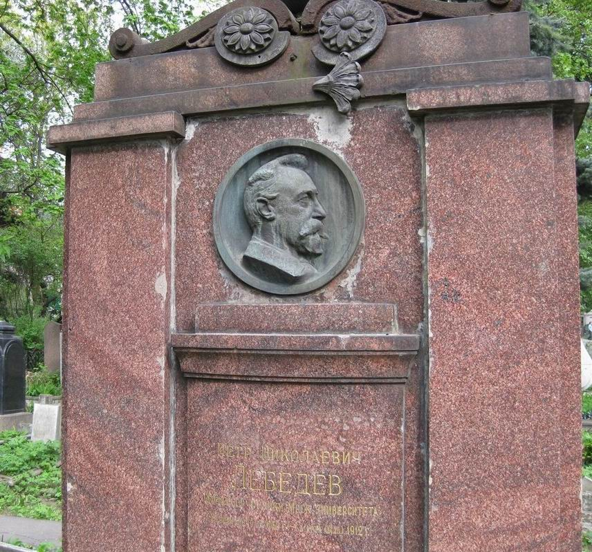 Памятник Петру Николаевичу Лебедеву на Новодевичьем кладбище, 3 участок